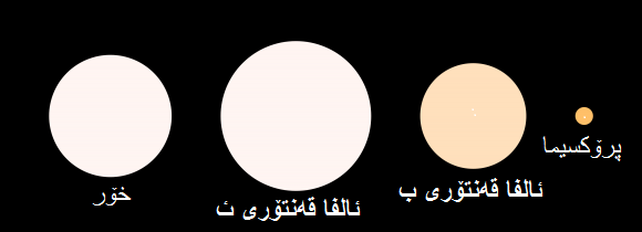 کوردی: بەراوردی ئەستێرەکانی قەنتۆری و خۆر